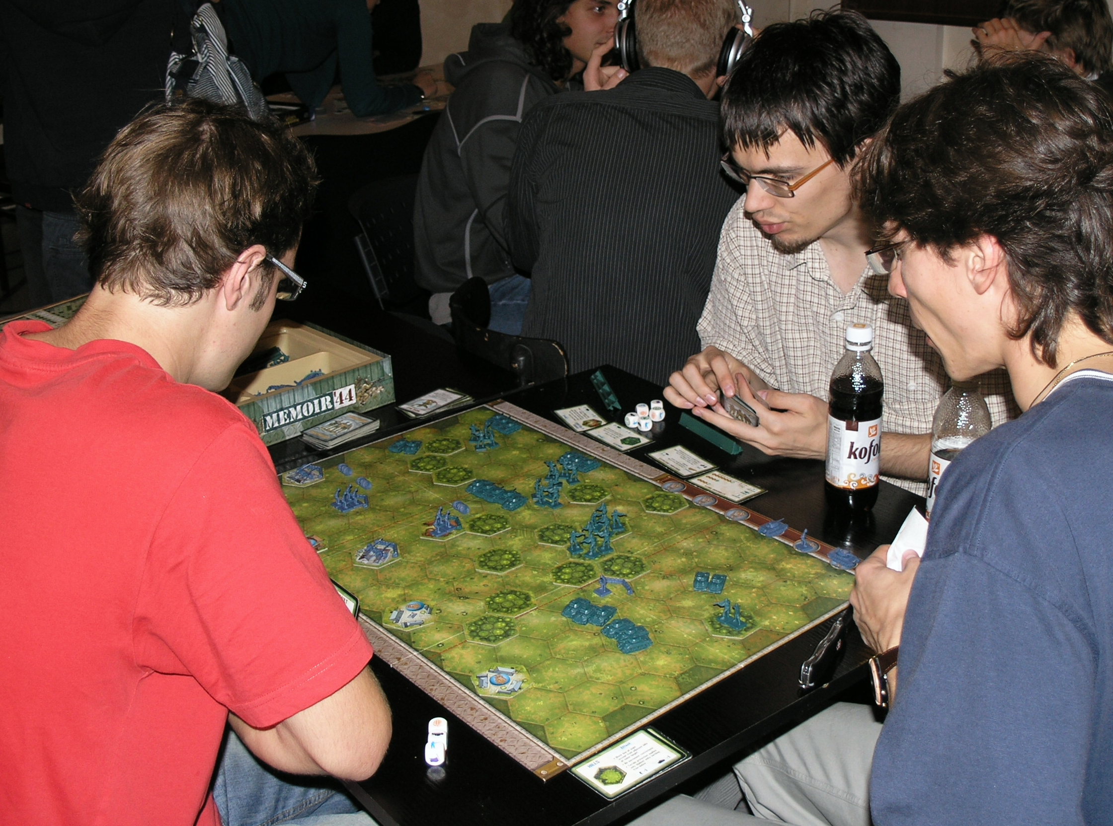 Deskohraní 2008